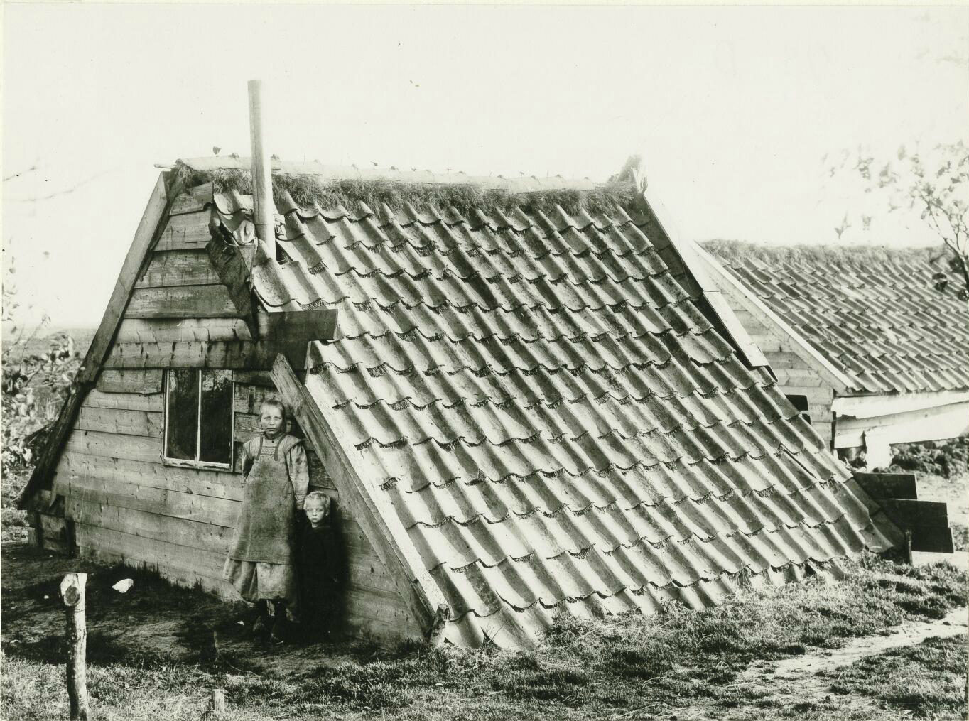 Hut van Fr. Smit bij het Lieskemeer